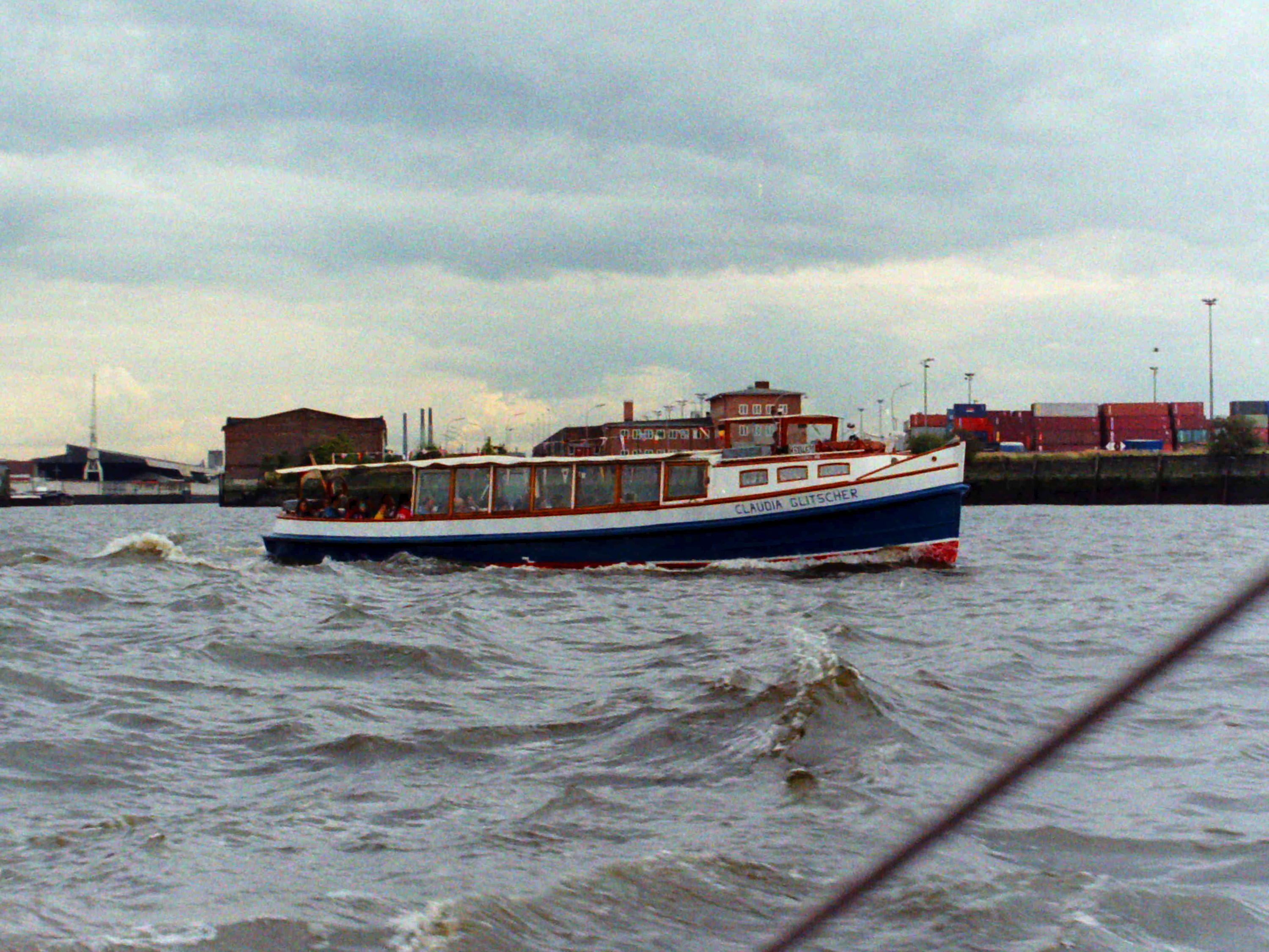 Hafenrundfahrt, Hamburg 1993. Barkasse Claudia glitscher